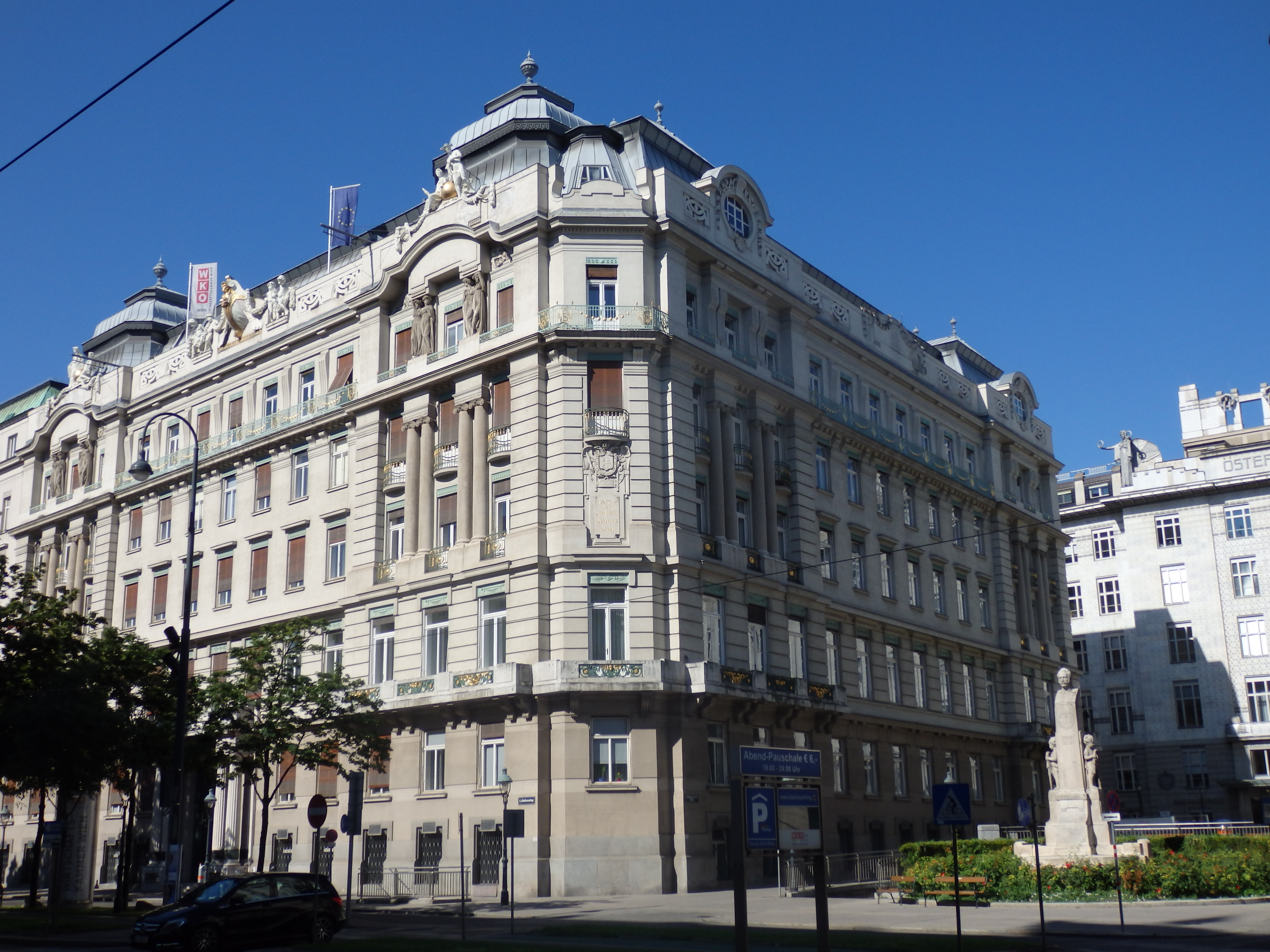 Ehemalige Handelskammer (1905-1907) von Ludwig Baumann, heute Wirtschaftskammer, Georg-Coch-Platz 1, Wien-Innere Stadt